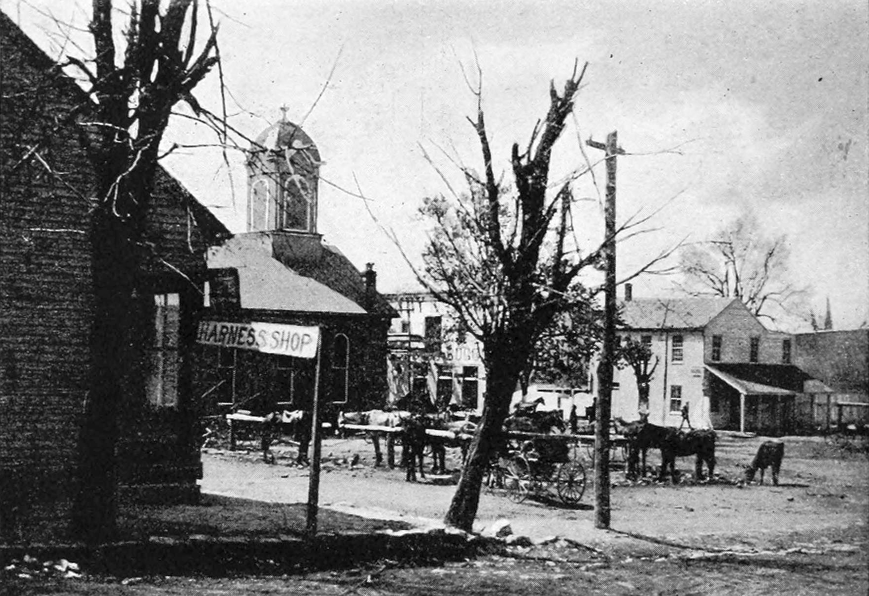 Hodgenville, Kentucky.